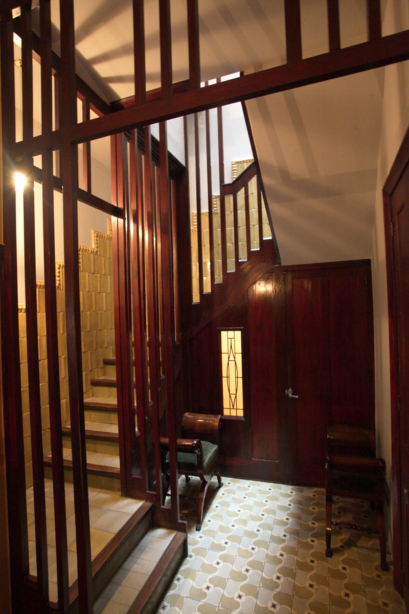 Casa Masó (Girona)